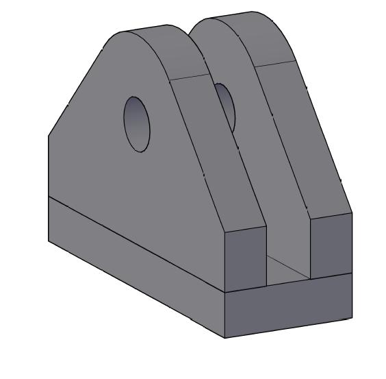 Dessin 3D d'une chape effectué sur Autocad 2006